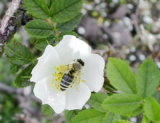 hymenoptère (juin france)